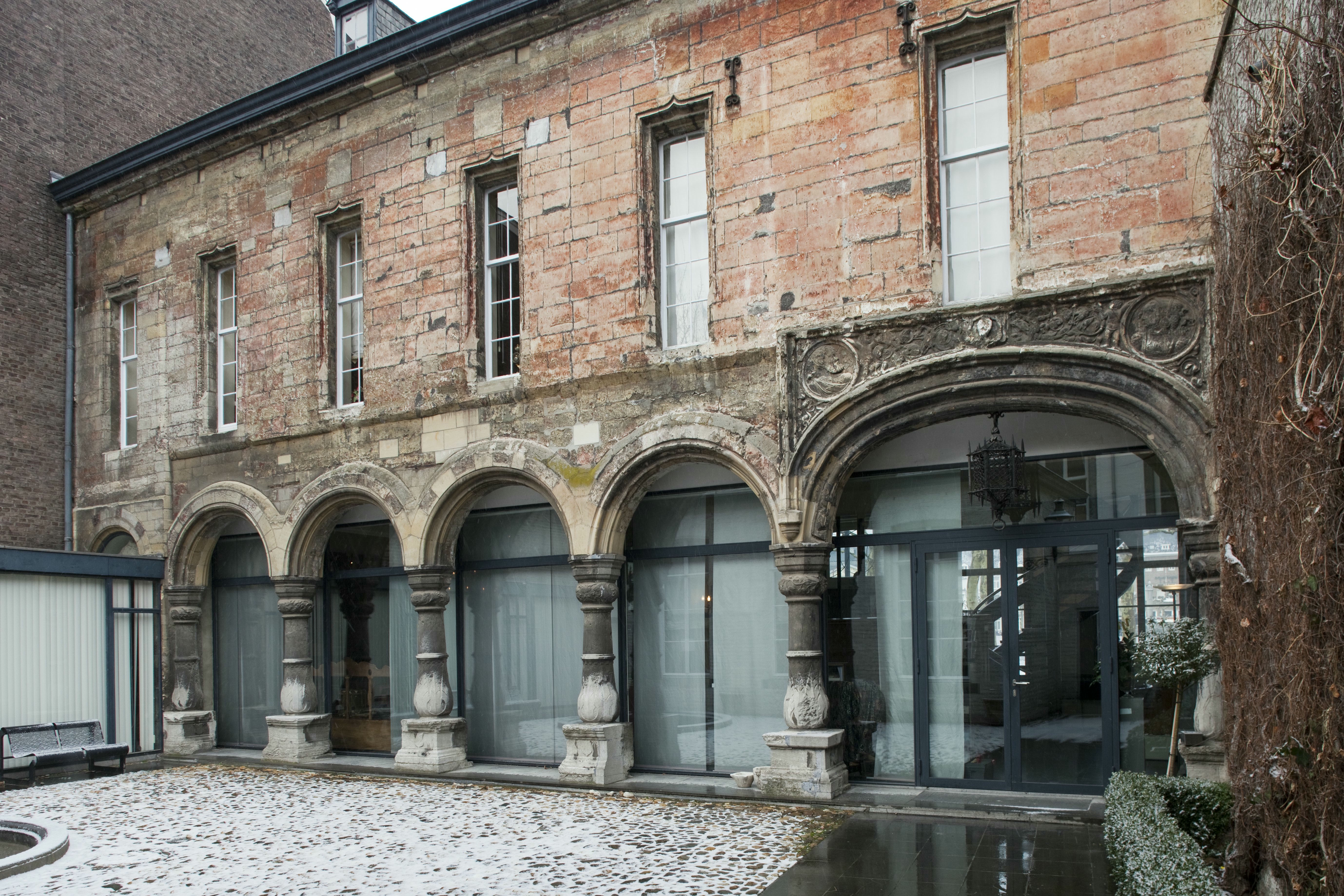 Spaans Gouvernement: Spaans Gouvernement, thans museum: gevel aan de binnenplaats, met arcade